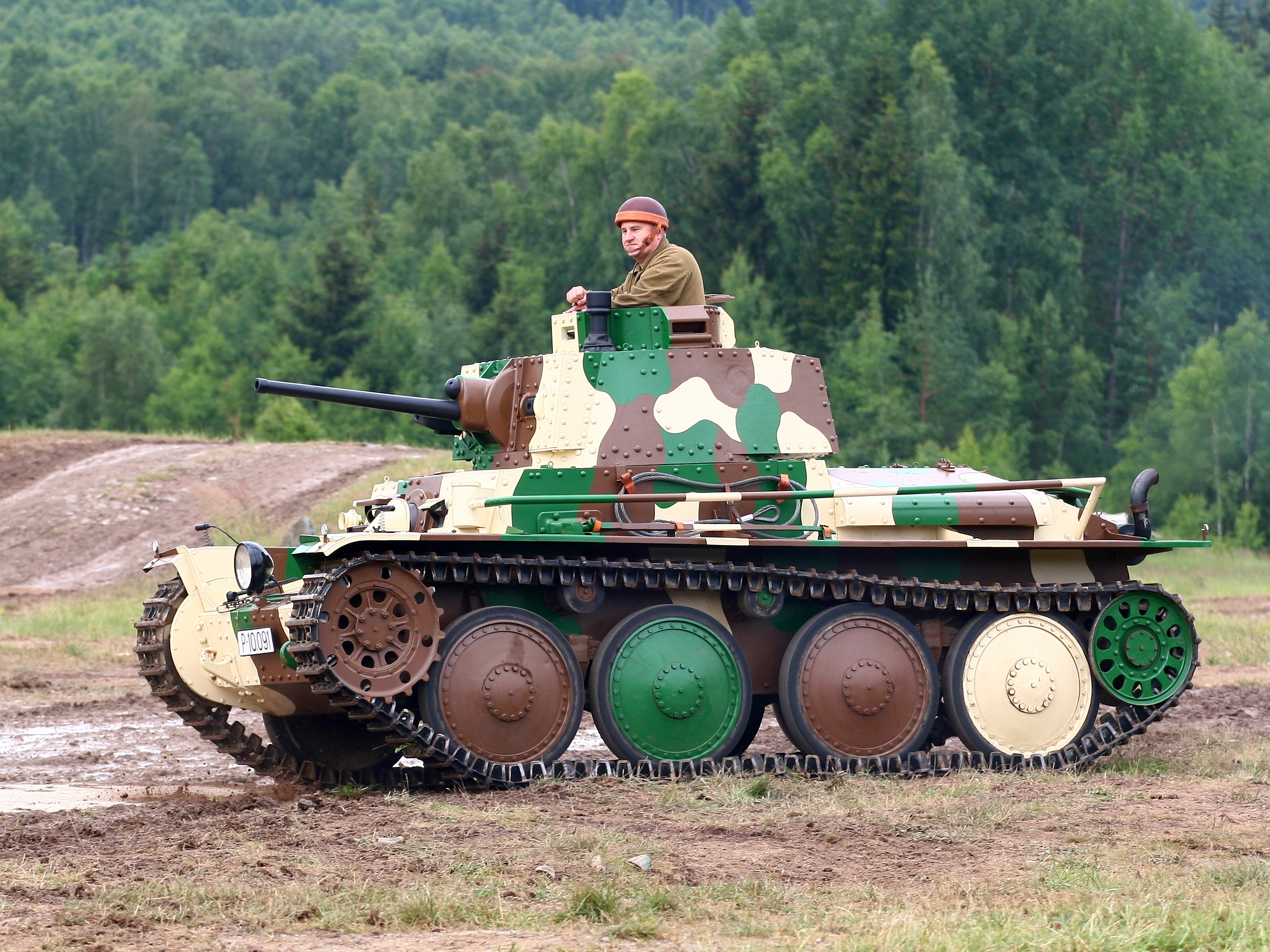 Vojenská technika zaznamenaná při dynamických ukázkách na Dni pozemního vojska BAHNA 2018, který pořádá Velitel společných sil a Nadace pozemního vojska AČR.